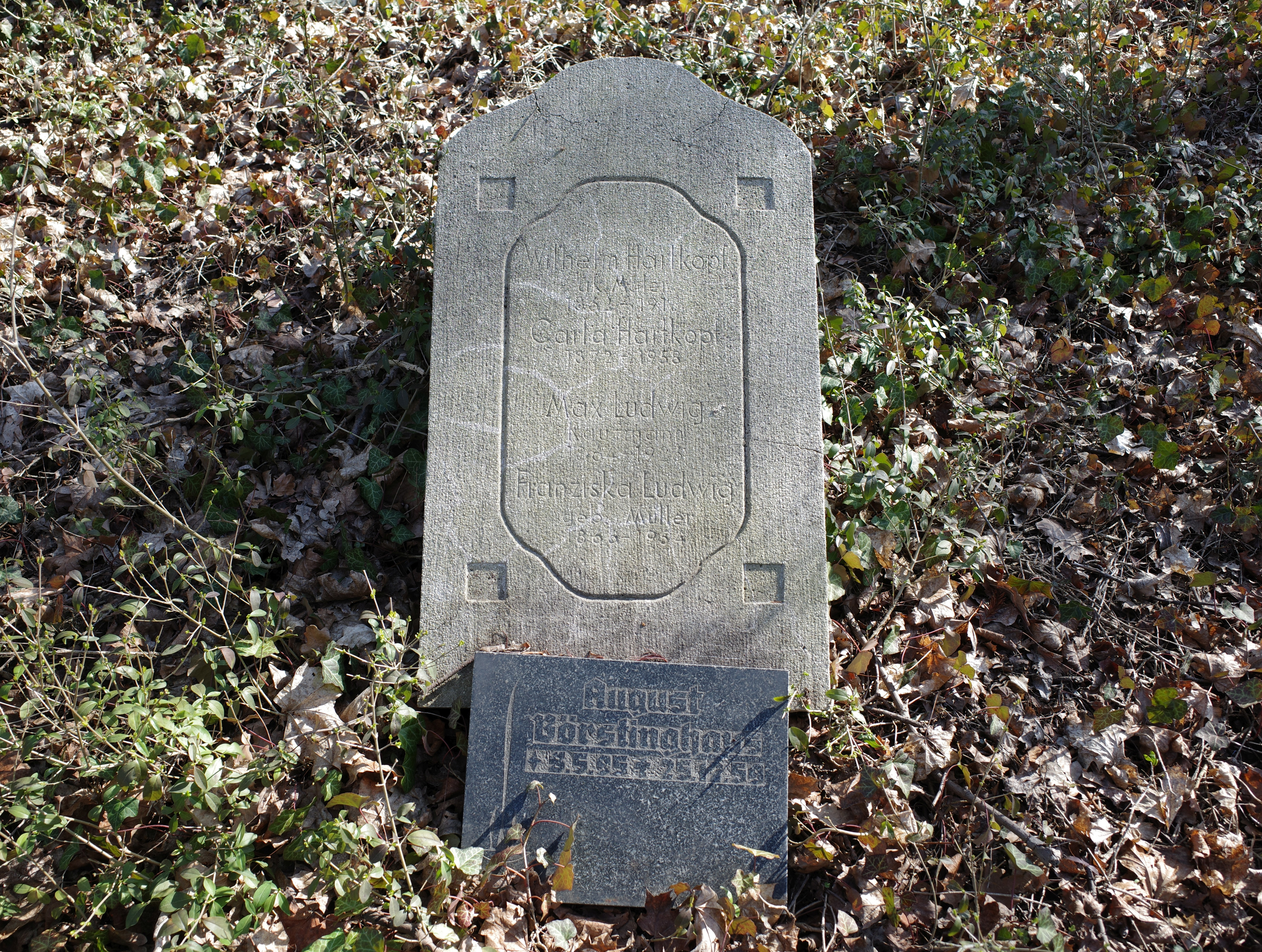 Dessau, Friedhof 3. Ruhestätte vom Maler Wilhelm Hartkopf in Dessau.